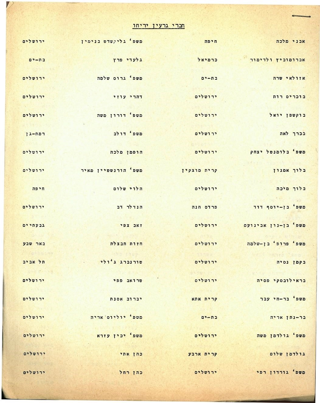 רשימת חברי גרעין יריחו עמוד 1